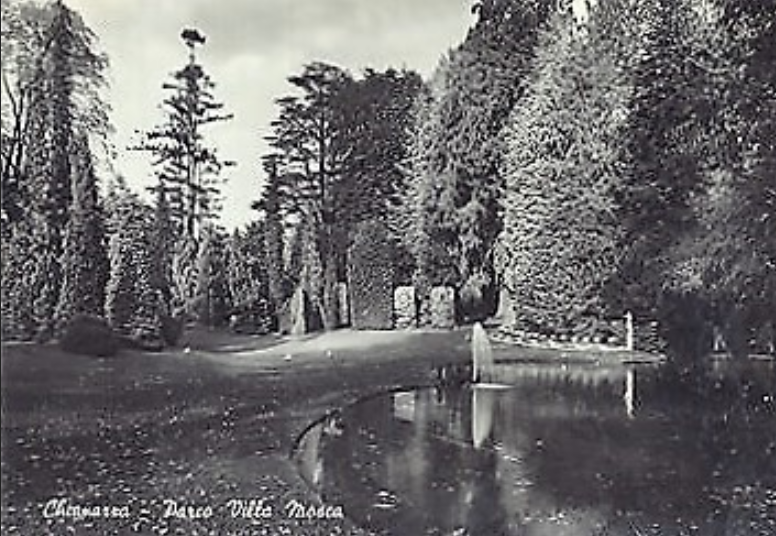 parco di Villa Mosca, Chiavazza (Biella), vecchia cartolina